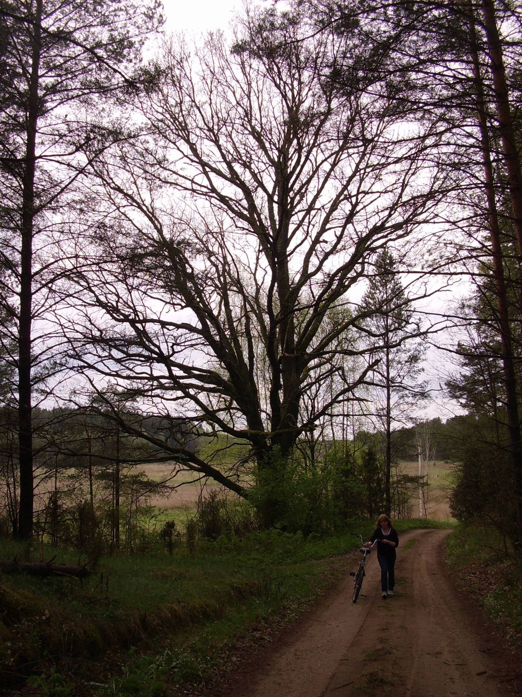 Dubininko ąžuolas. Autorius: zove.mykolas.